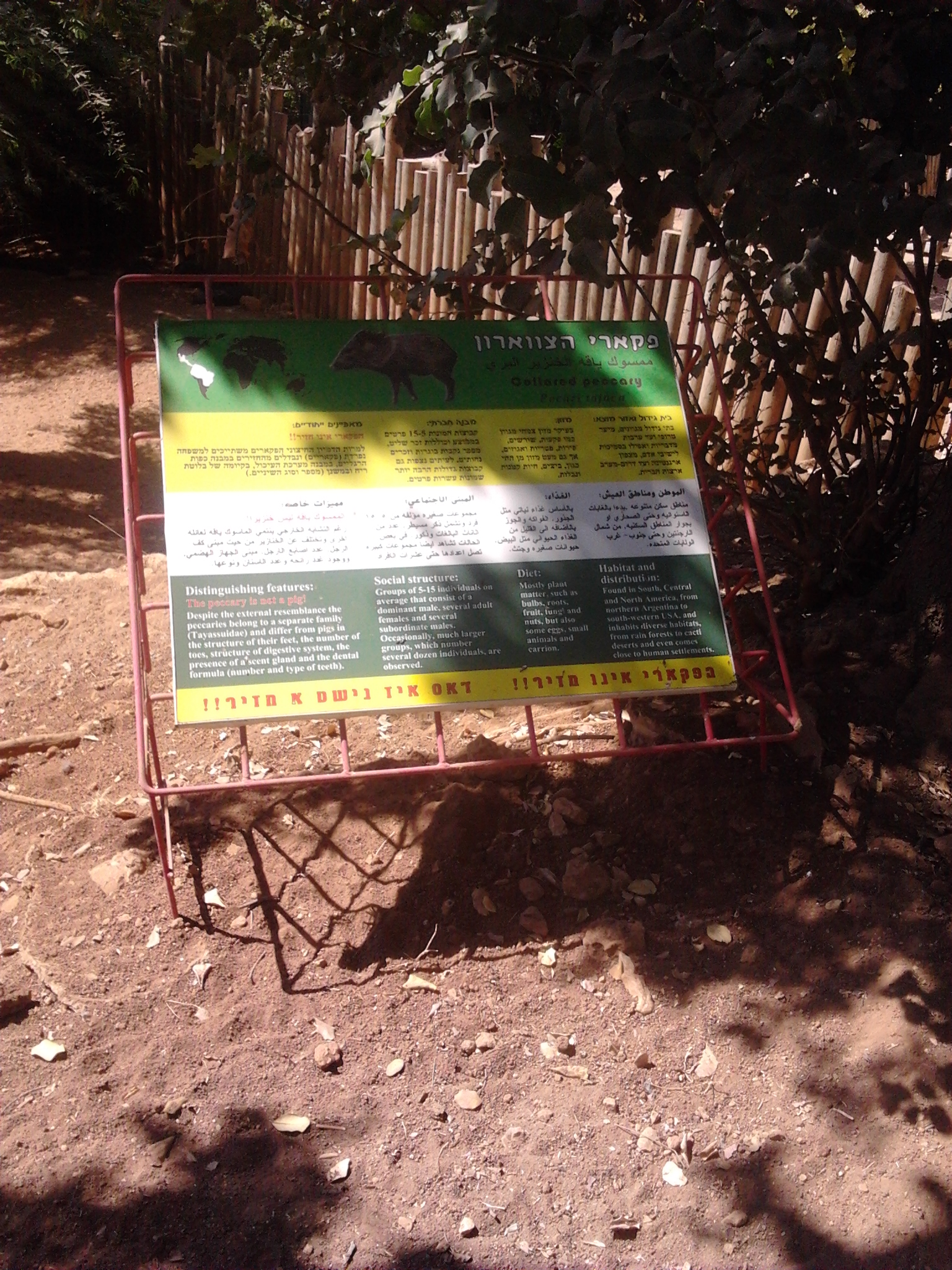 ייִדיש: דאס איז נישט א חזיר